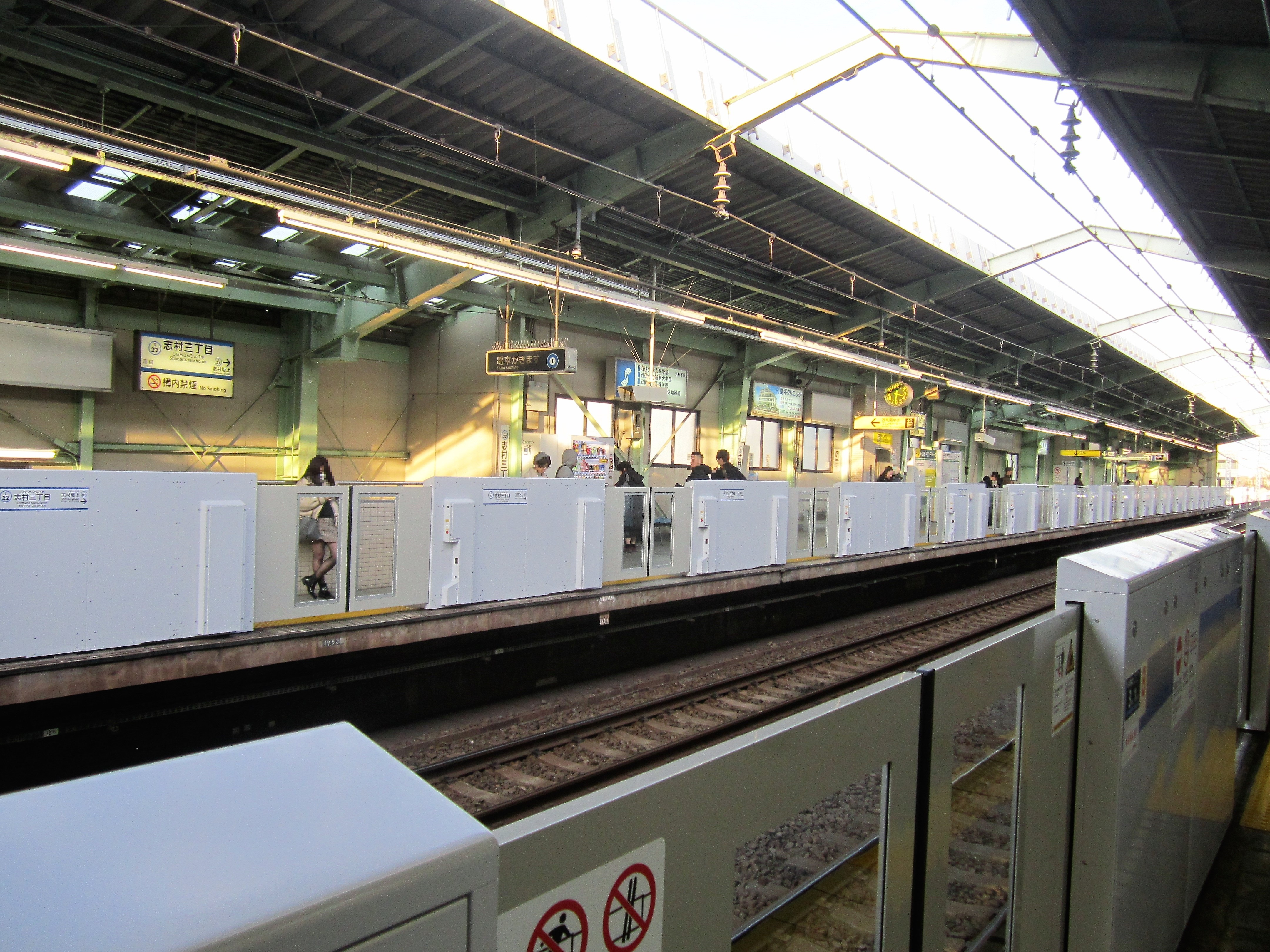 志村三丁目駅ホーム（2019年12月）